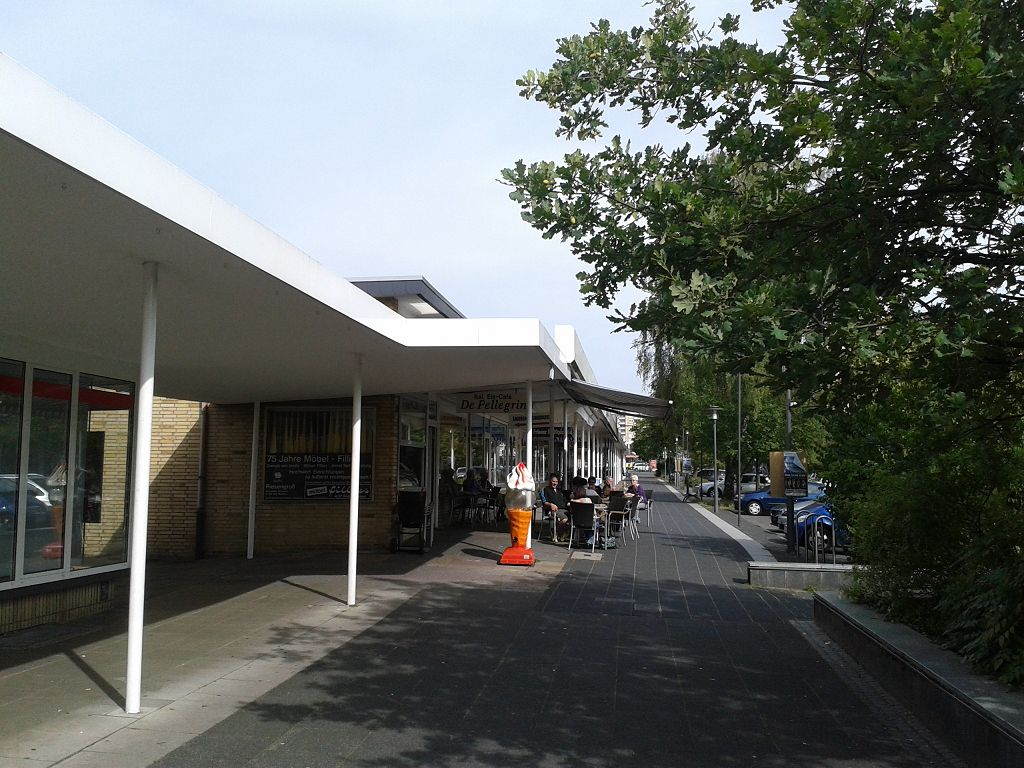 Ladenzeile untere Elbeallee, Sennestadt